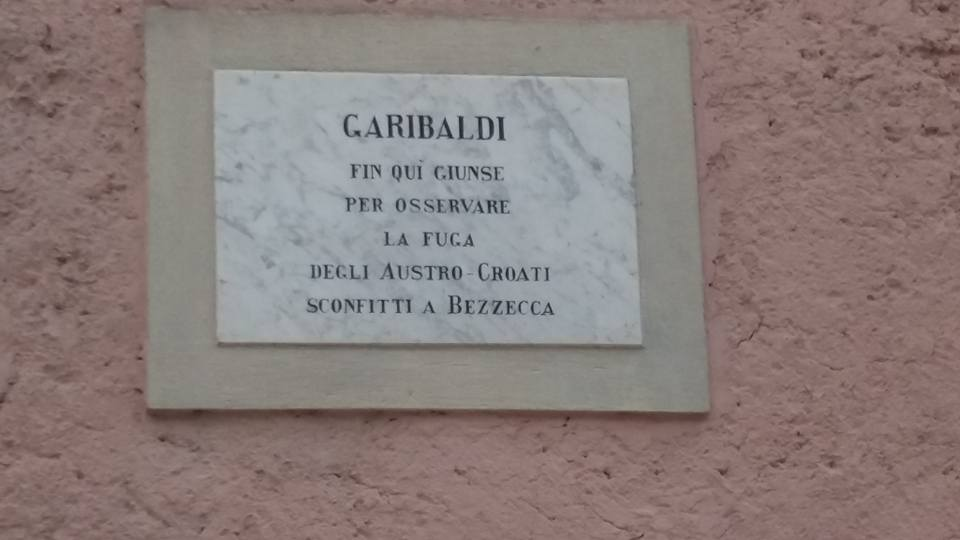 Lenzumo, Val di Ledro, lapide commemorativa della guerra del 1866